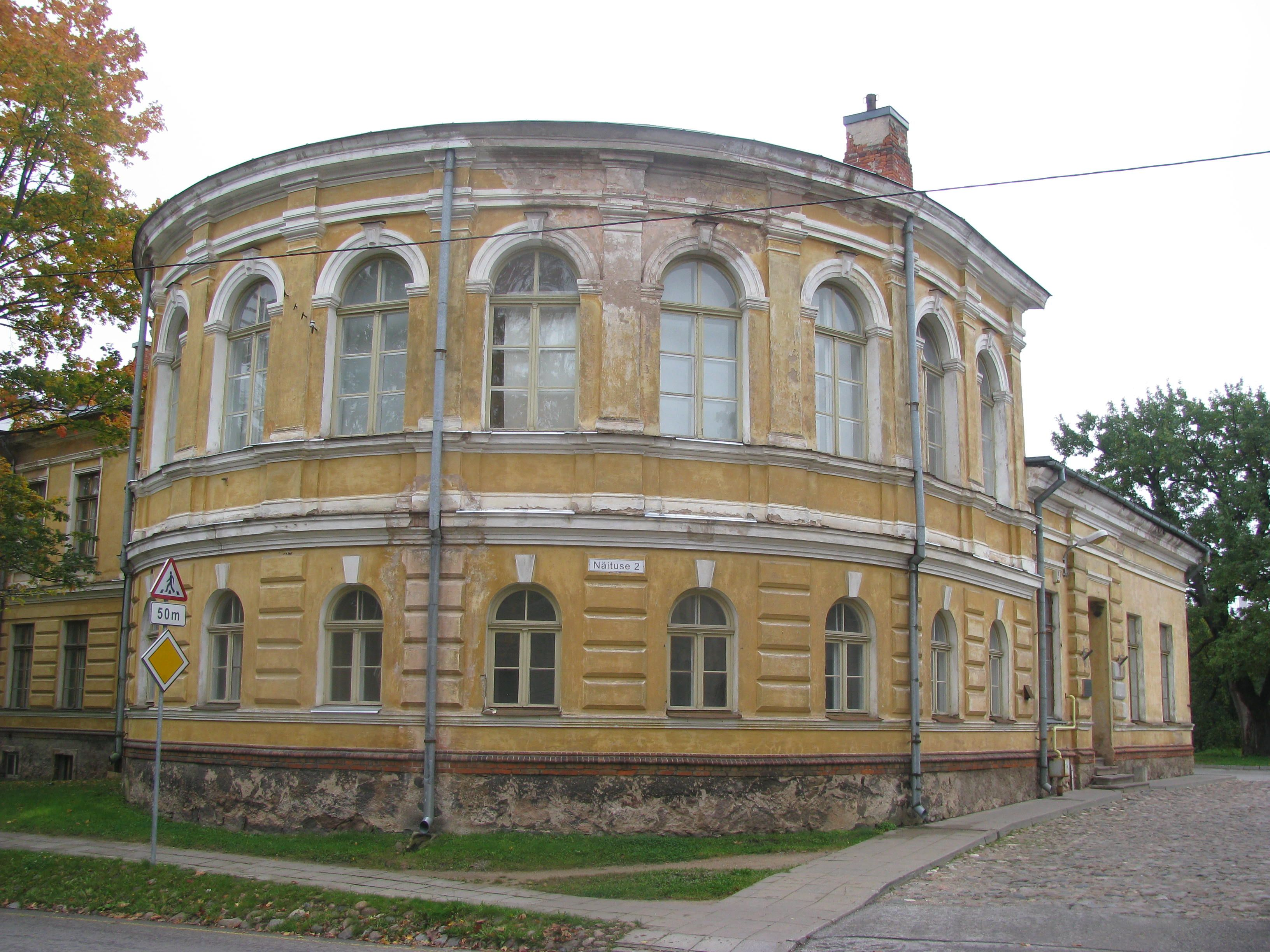 Uus Anatoomikum Tartus Näituse 2, vaade Näituse tänavalt. Arhitektid: Reinhold Guleke ja Rudolf von Bernhard (†1887)